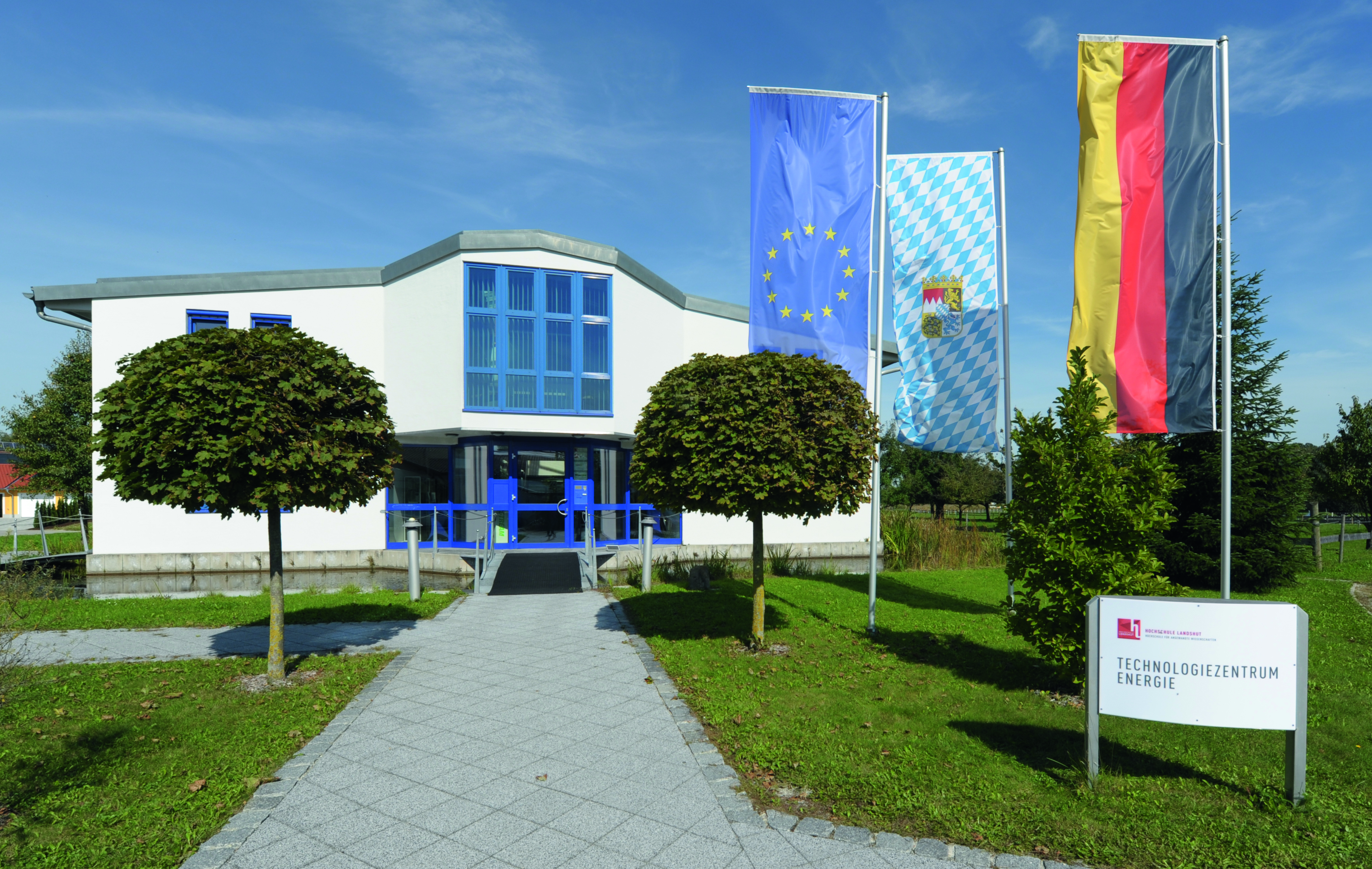 Das TZ Energie bündelt die Expertise der Hochschule Landshut in der Energieforschung. In Ruhstorf an der Rott entwickeln wir die technischen Lösungen für die Zukunft der Energie.